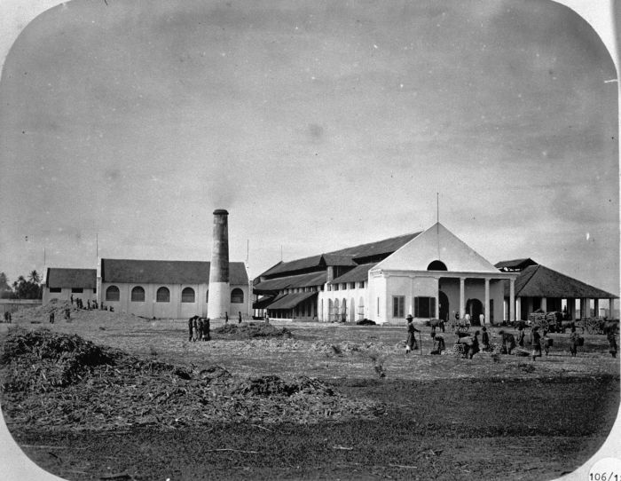 Foto. Deze suikeronderneming was eigendom van Mankunegoro IV, opgericht in 1862.. De Colomadu suikerfabriek in Malangjiwan, in de omgeving van Soerakarta